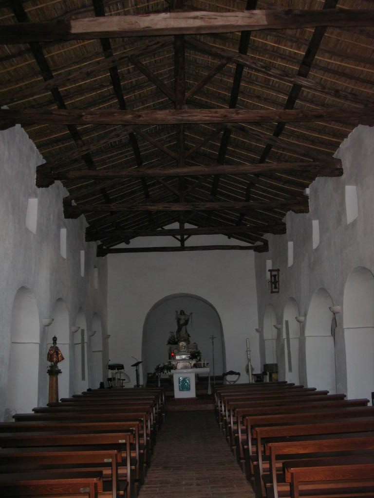 Santa Maria Nafarroakoaren barrukaldea.